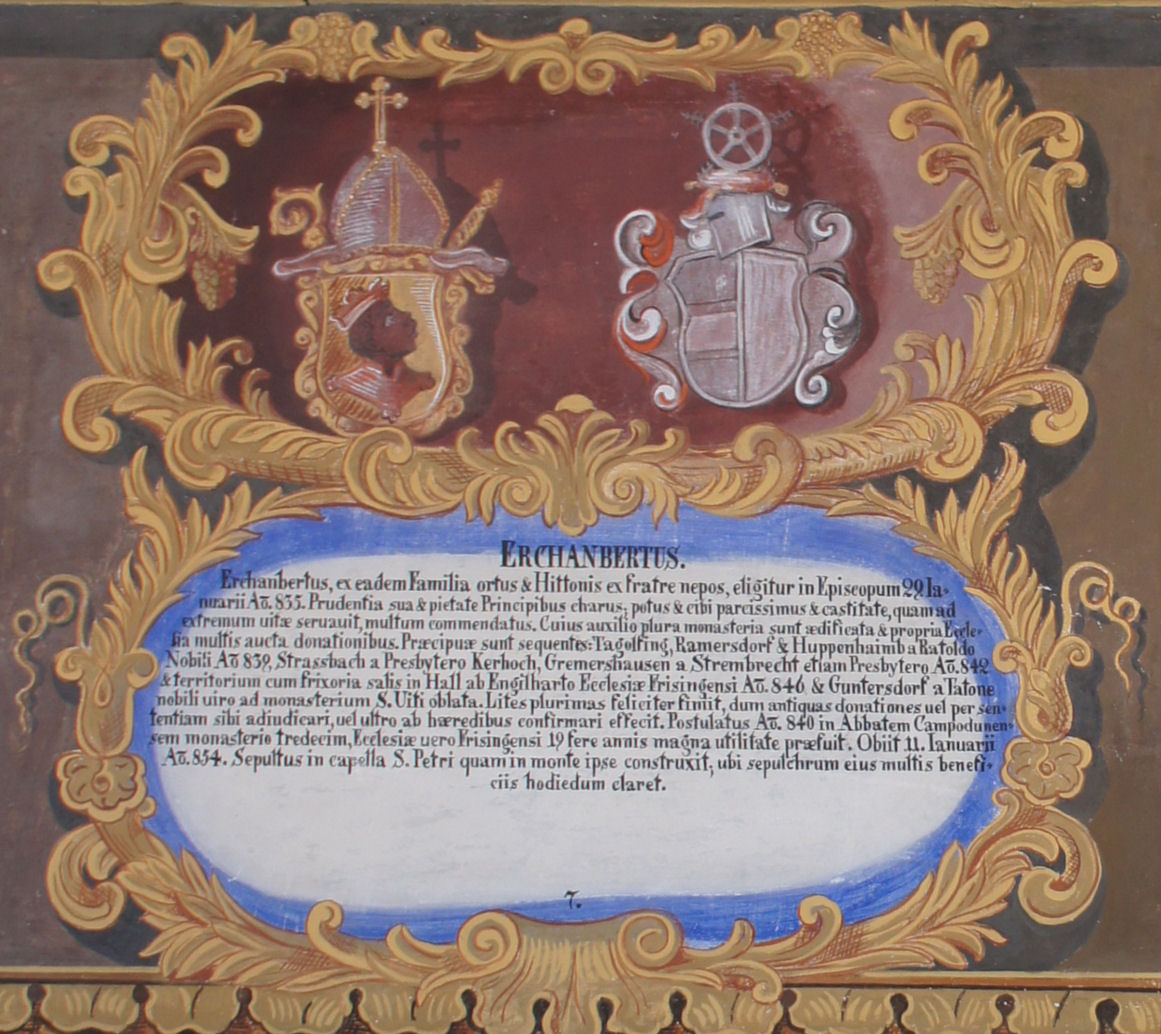 Wappentafel von Erchanbert, Bischof von Freising, im Fürstengang zwischen Fürstbischöflicher Residenz und Freisinger Dom. Links das geistliche, rechts das persönliche Wappen, darunter ein lateinischer Text mit kurzer Biographie.